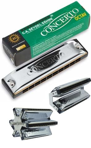 Seydel Oktavmundharmonika "Concerto" mit Kunststoffkanzellen